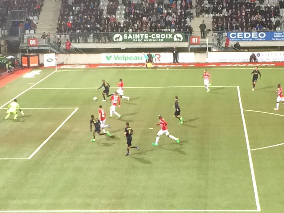 Mbappé vs ASNL.